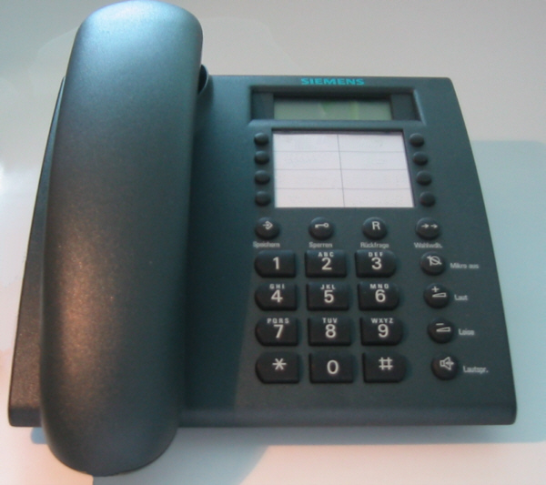 Tastentelefon